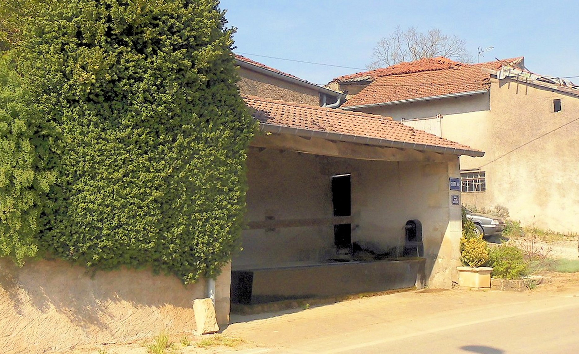 Lavoir de Soncourt